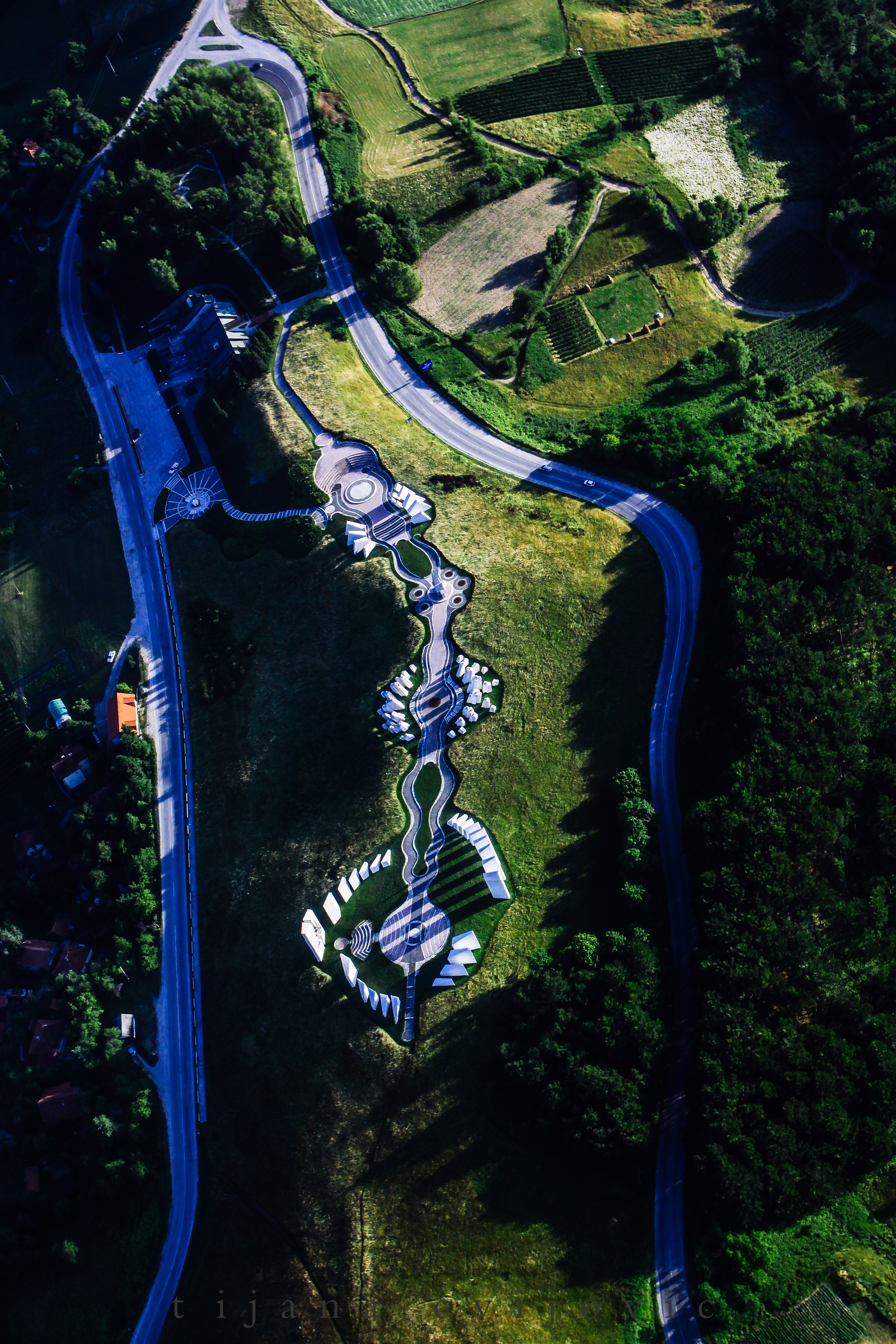 Ово је фотографија заштићеног природног добра у Србији под шифром: МПС25This is a a photo of a natural area in Serbia with ID: МПС25 Меморијални природни споменик Кадињача